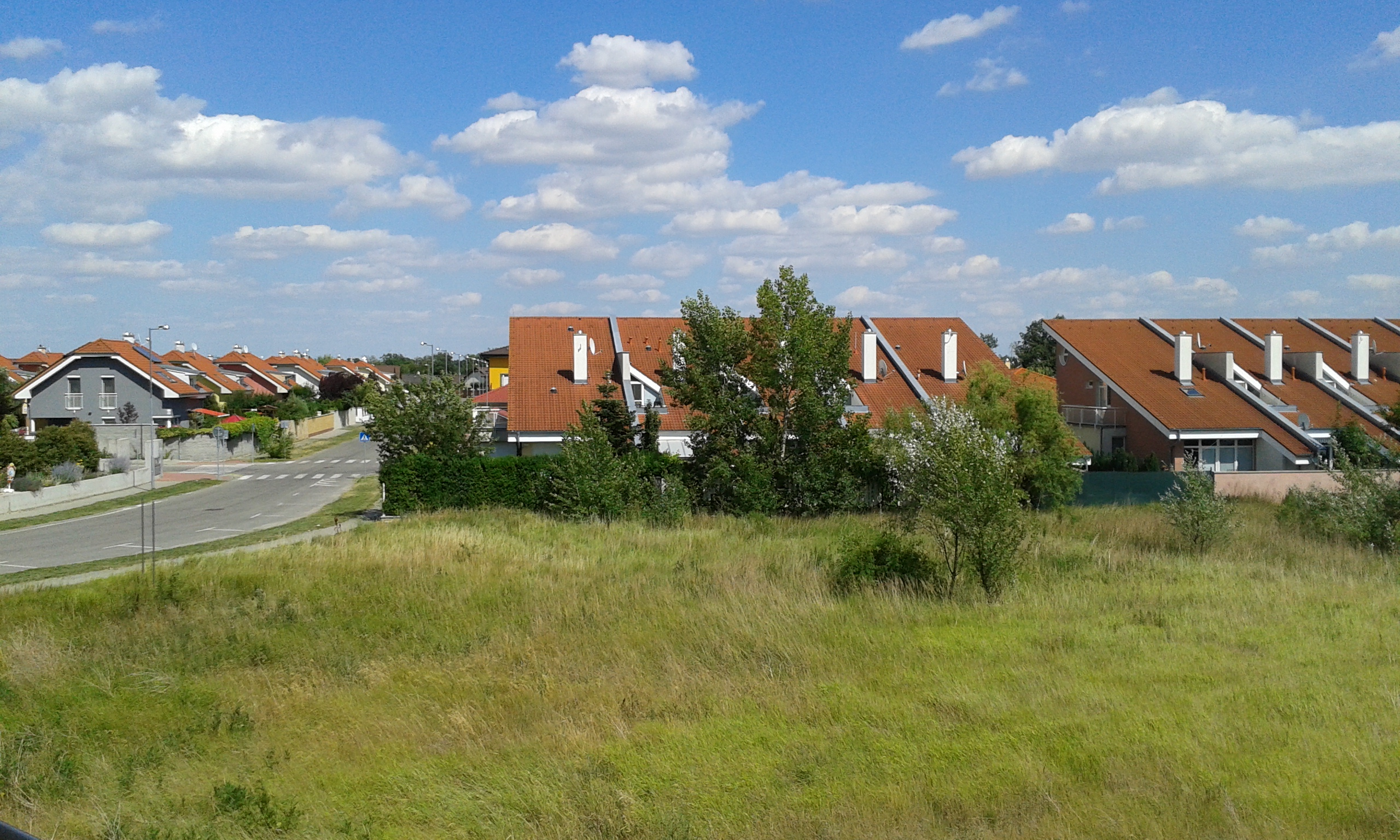 Pohľad na typickú ulicu v Čiernej Vode